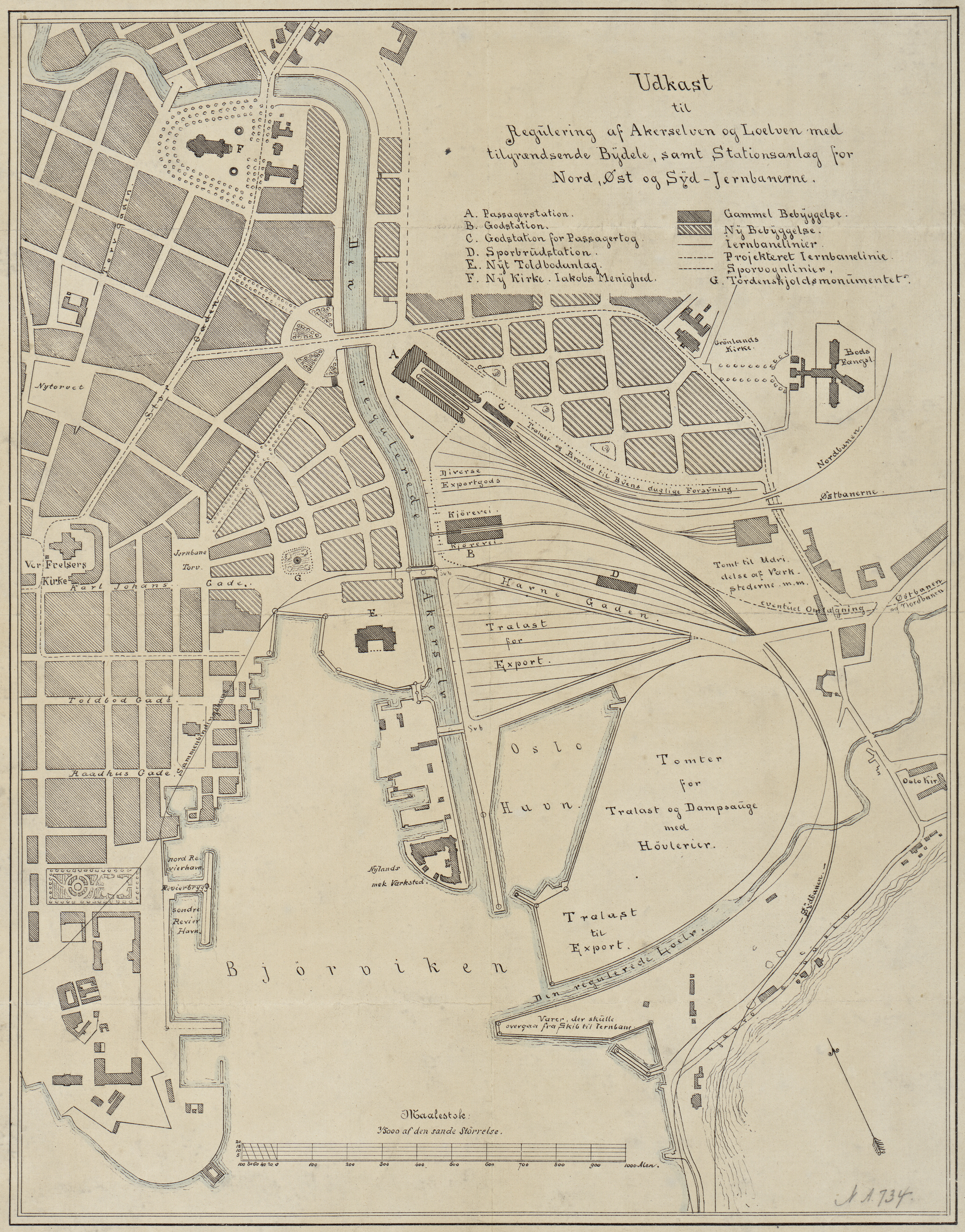 Kart fra Nasjonalbibliotekets kartsamling. Kartet er gitt ut i og viser .